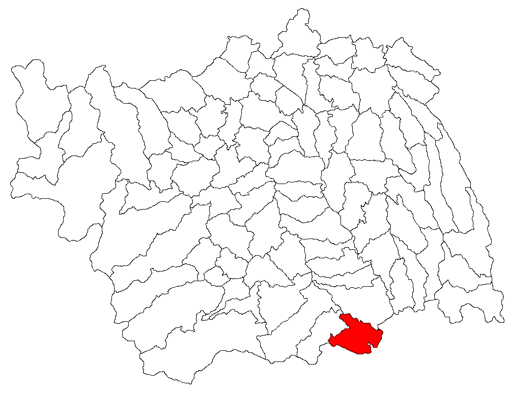 Categorie:Hărţi ale judeţului Bacău